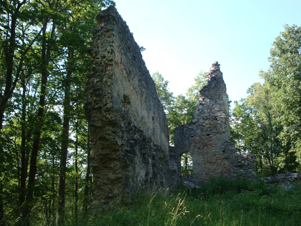 Konvendihoone varemed.